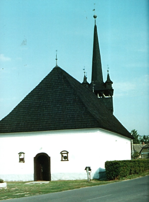 Tiszacsécse, Református templom